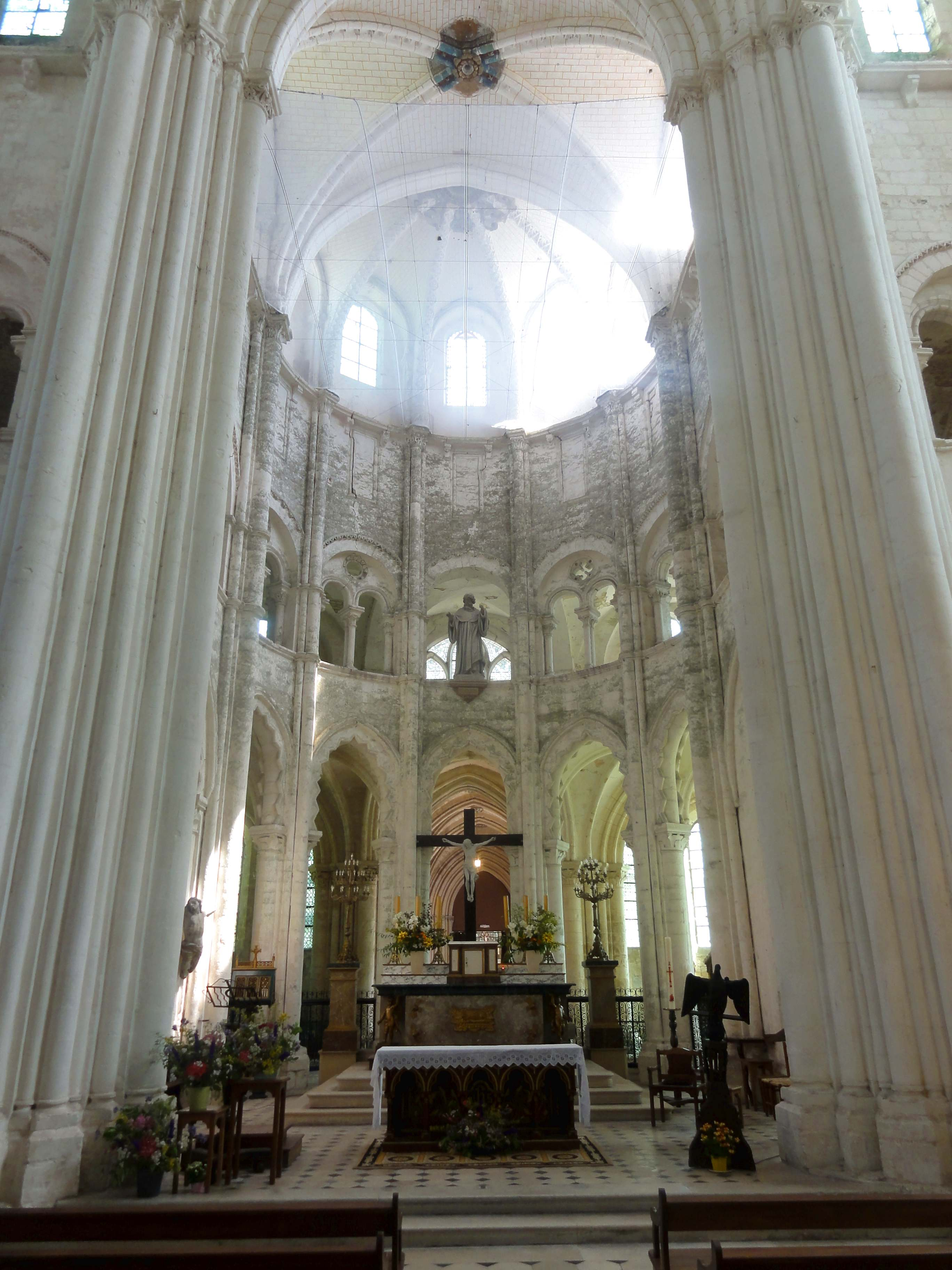 Chœur de l'abbatiale - voir le titre du fichier.